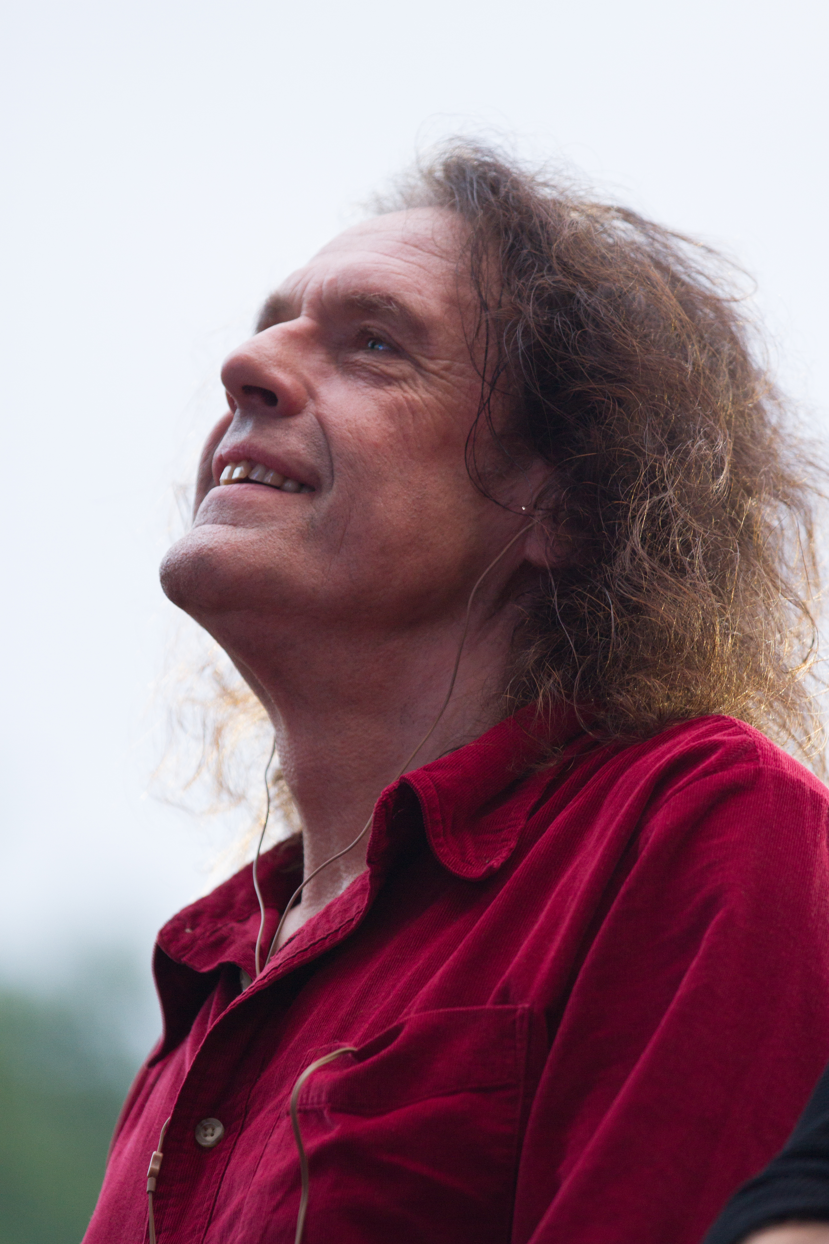 Michael Schwandt von Karat beim "Karat 40 Jahre KARAT - Das EINZIGE Jubiläumskonzert" in der Berliner Waldbühne am 20.06.2015